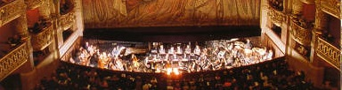 La fosse d'orchestre avec les musiciens et les pupitres, avant le lever de rideau.